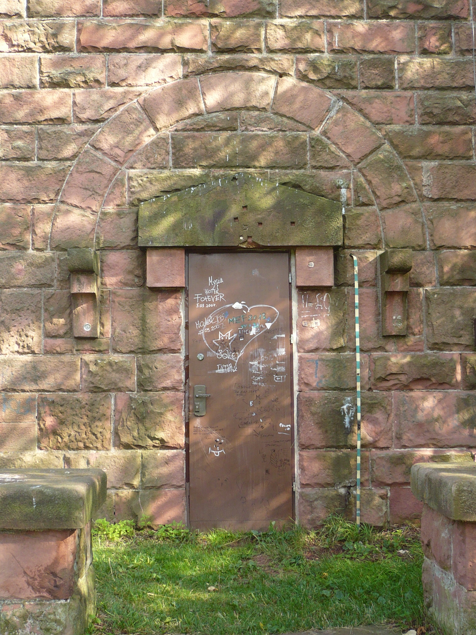 Nowa Ruda, wieża na Górze św. Anny